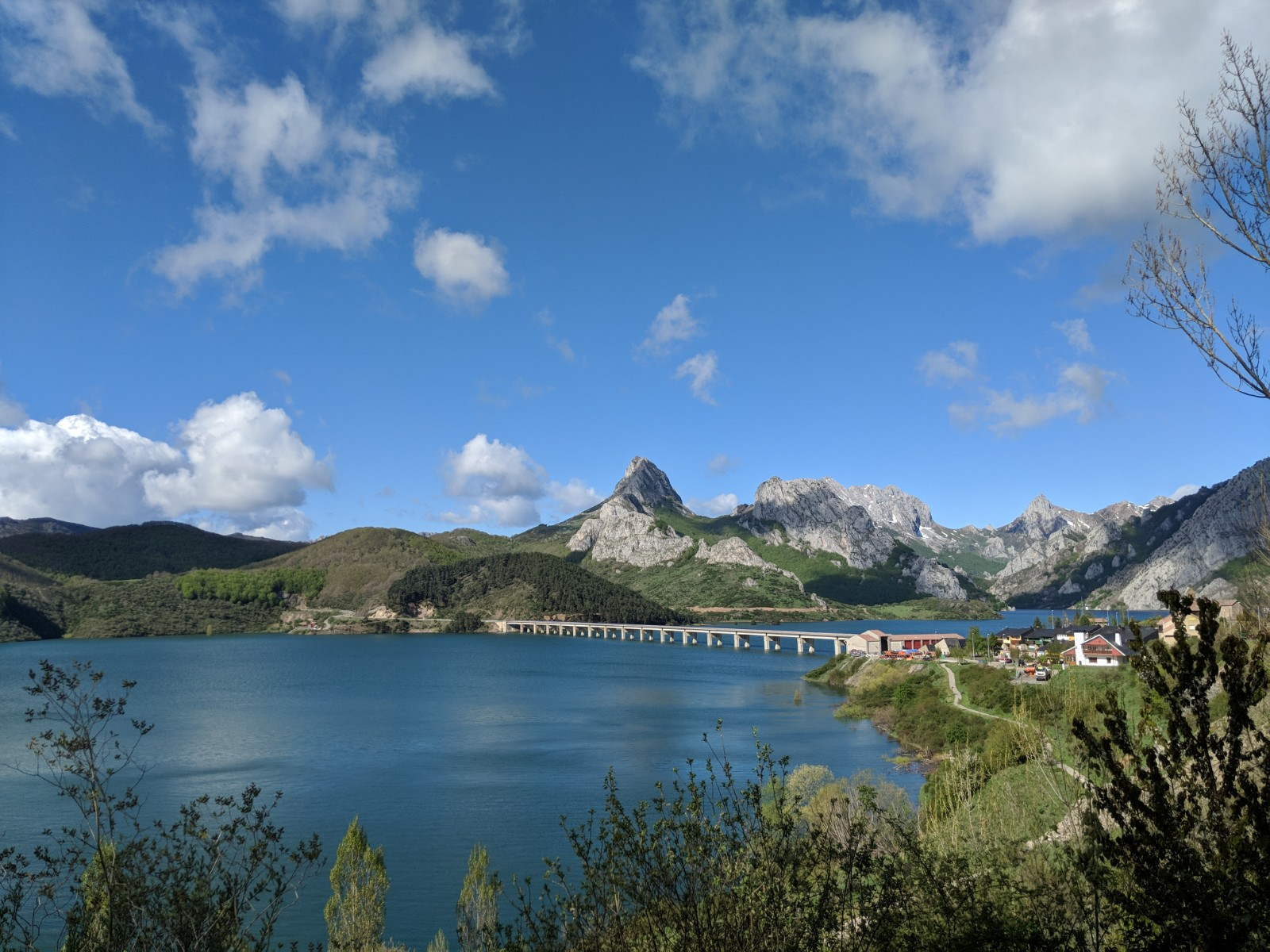 Foto sacada en el embalse de Riaño This is a photography of a Site of Community Importance in Spain with the ID: ES4130003. Natura2000 entry, EEA entry